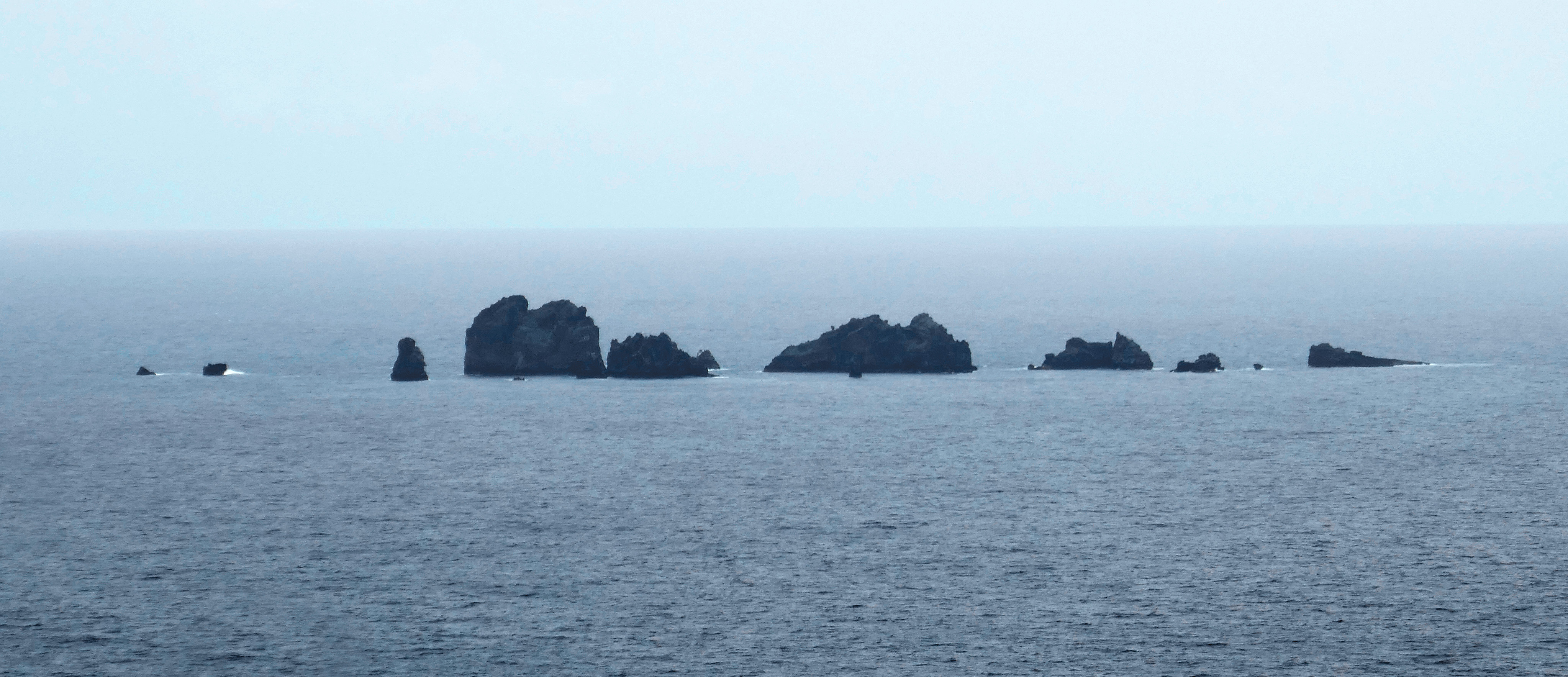 Les Sete Pedras (ou "sept pierres"), une série d'îlots rocheux inhabités au large de l'île de São Tomé (São Tomé-et-Principe), vues ici depuis Ribeira Peixe, au sud-est.